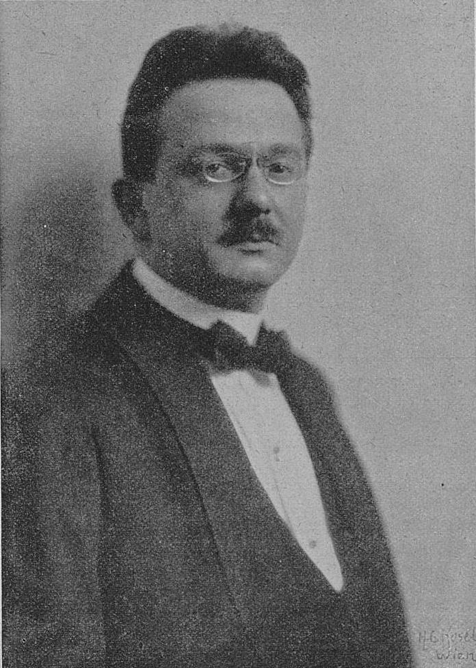 Porträtfoto von Franz Schmidt